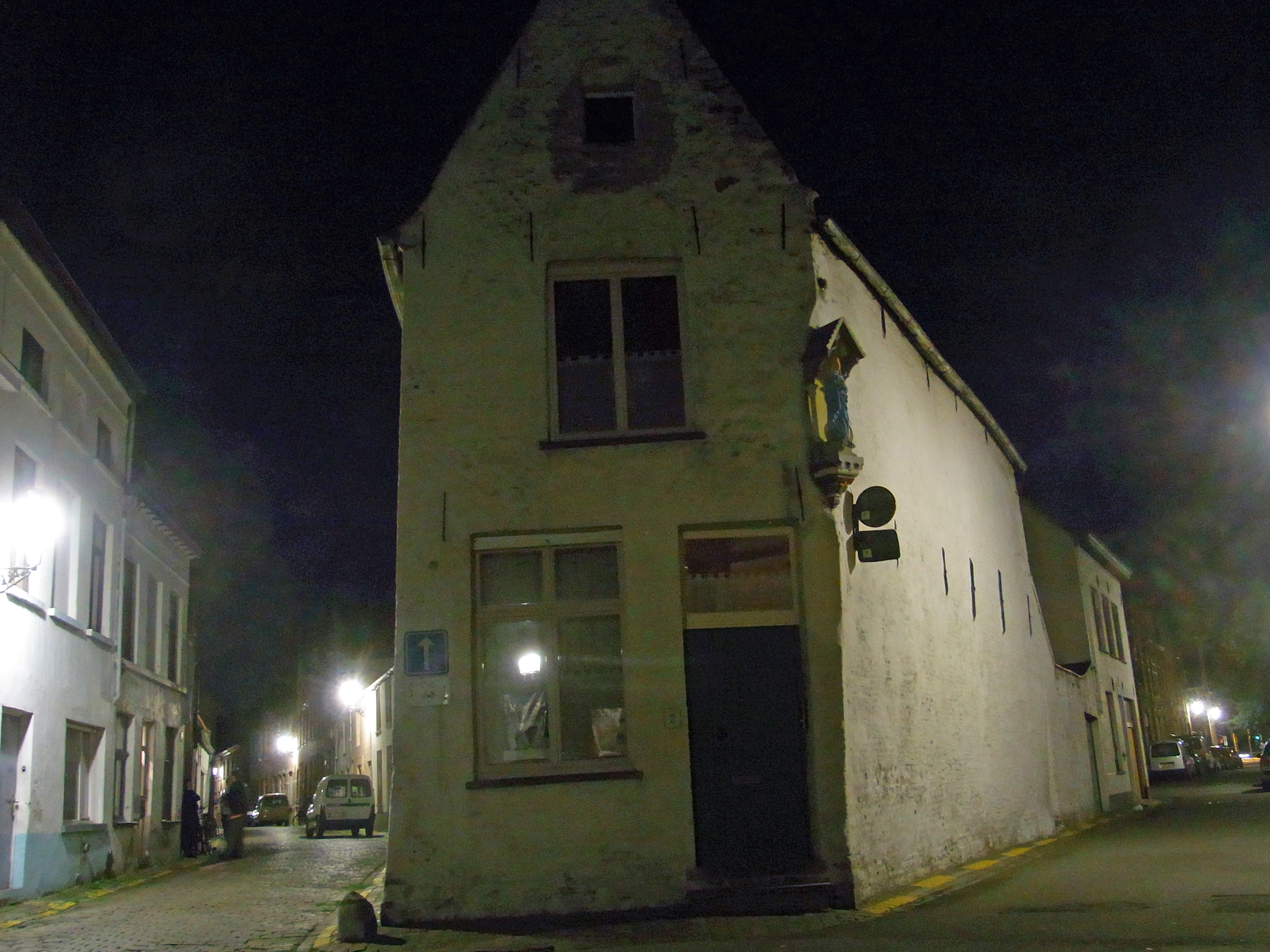 Brügge: Mortierstraat 2